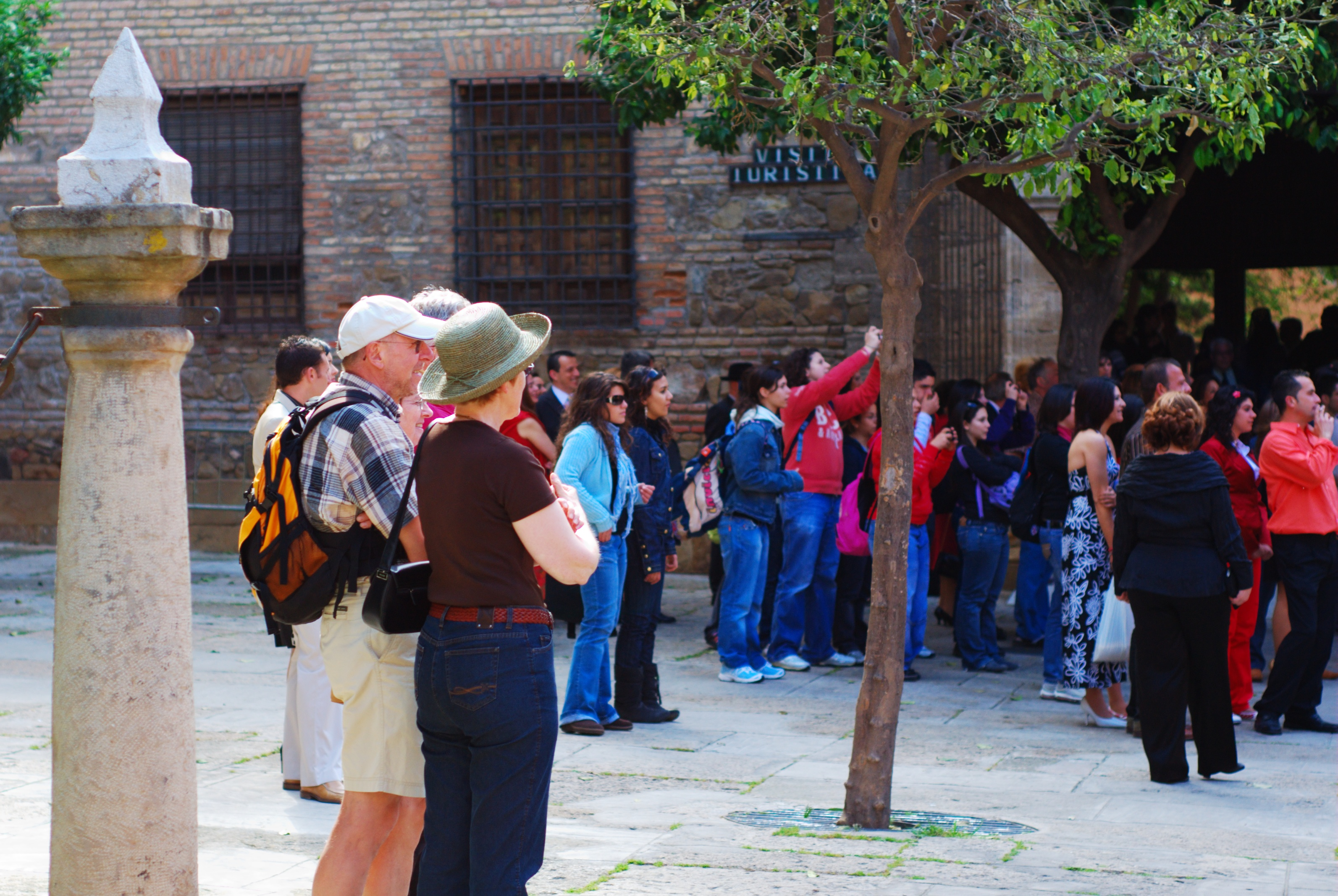 Turistas en el patio de los naranjos, observando la entrada de una novia a la iglesia del Sagrario.